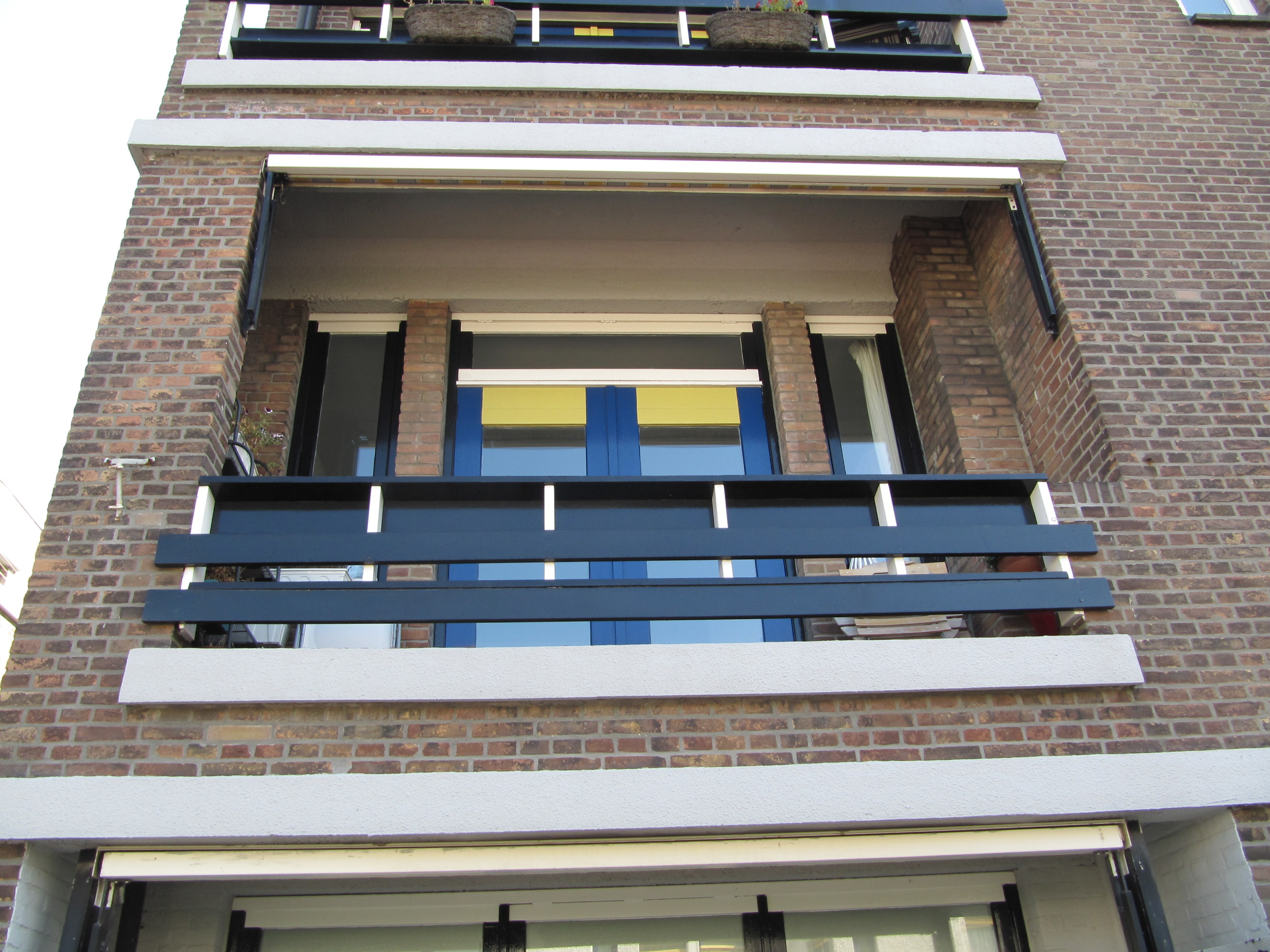 RM46625 Den Haag - Klimopstraat (detail balkon).jpg